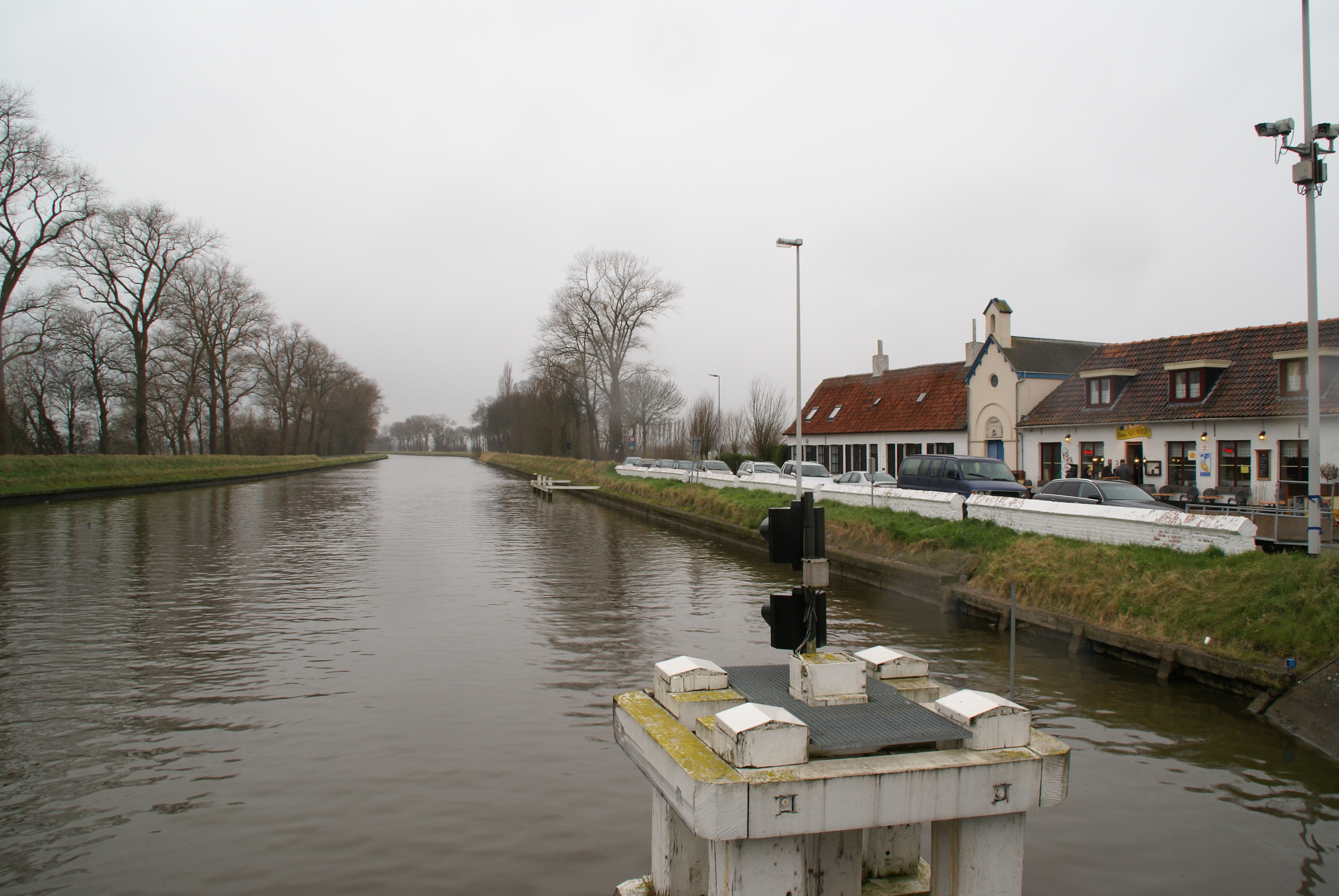 Nieuwege (Varsenare) (Belgium)The canal Bruges-OstendEl canal Brujes-Oostende cap a OostendeLe canal Bruges-Ostende en direction d'OstendeDe Oostendse vaart in de richting van OostendeDen ostensjche voart in de richtienge van Ostende